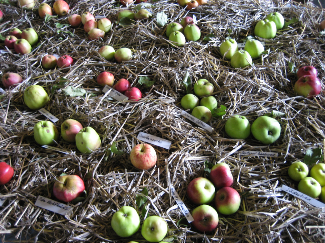 verschiedene, vor allem ältere Apfelsorten; fotografiert auf dem Apfelfest der norddeutschen Apfeltage 2005 im Hamburger Umweltzentrum